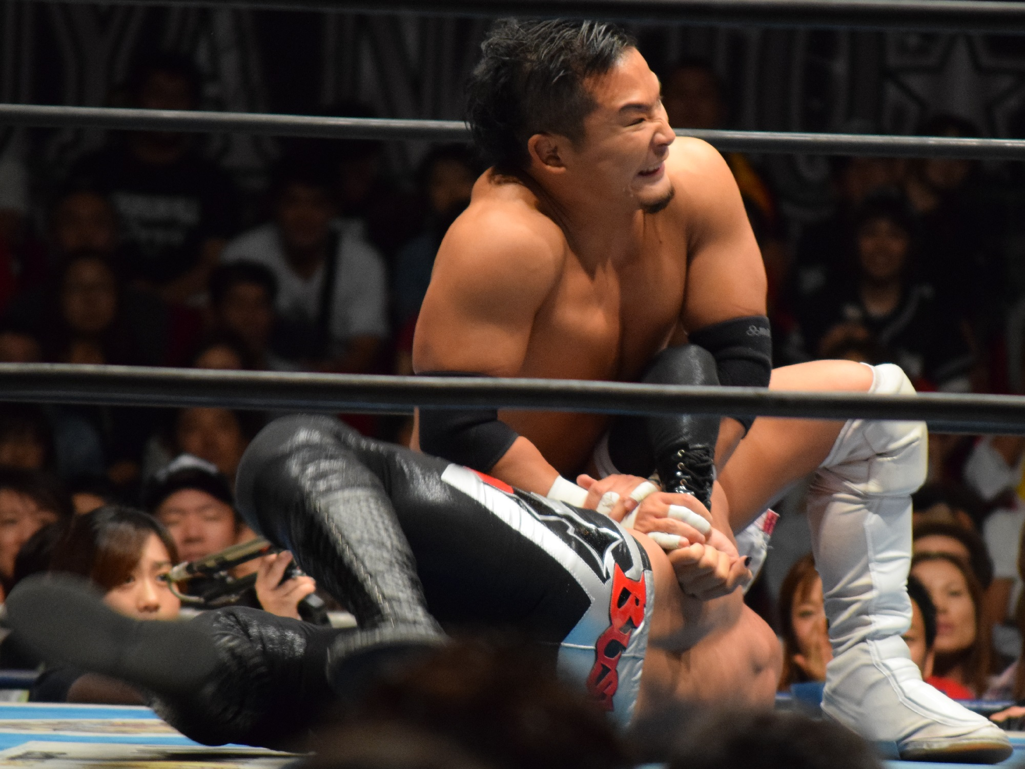 2016年9月25日 ワールド記念ホール「DESTRUCTION in KOBE」 BUSHIにホバーボードロックを極めるKUSHIDA